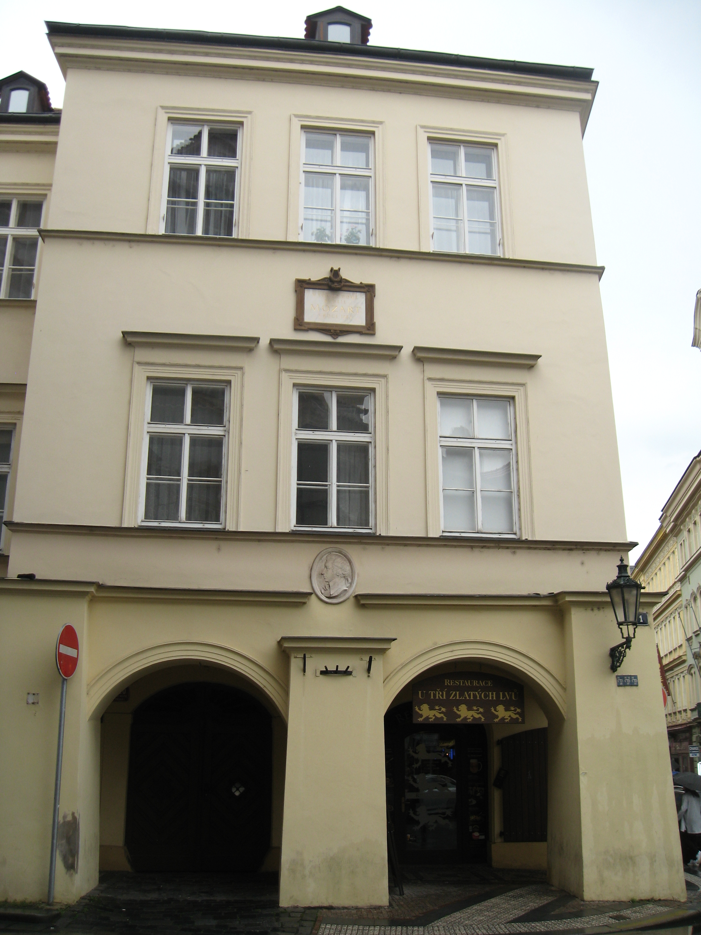 Dům na rohu Uhelného trhu.